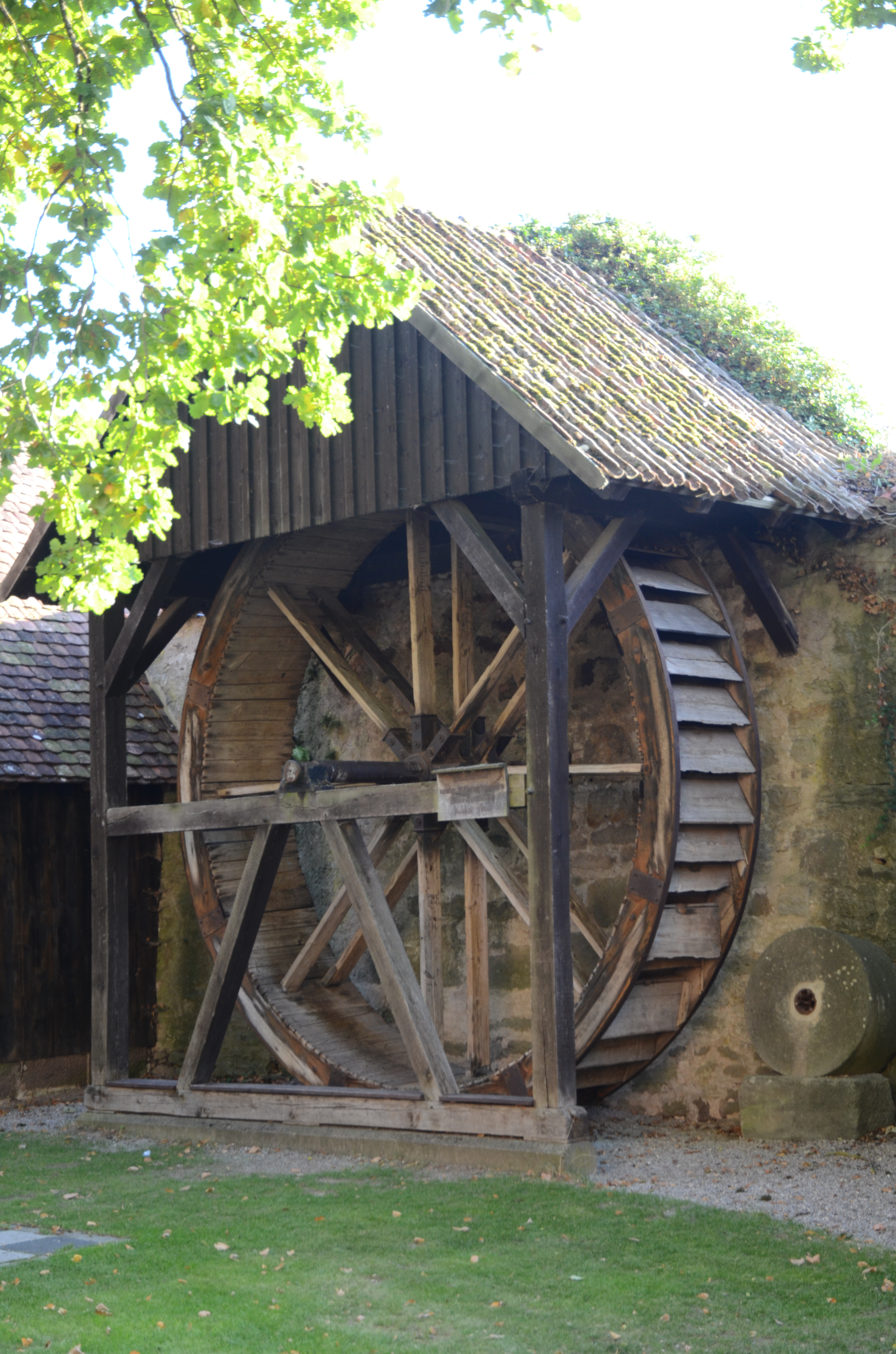 Dinkelsbühl Dr.-Martin-Luther-Straße 6b-c Mühlrad